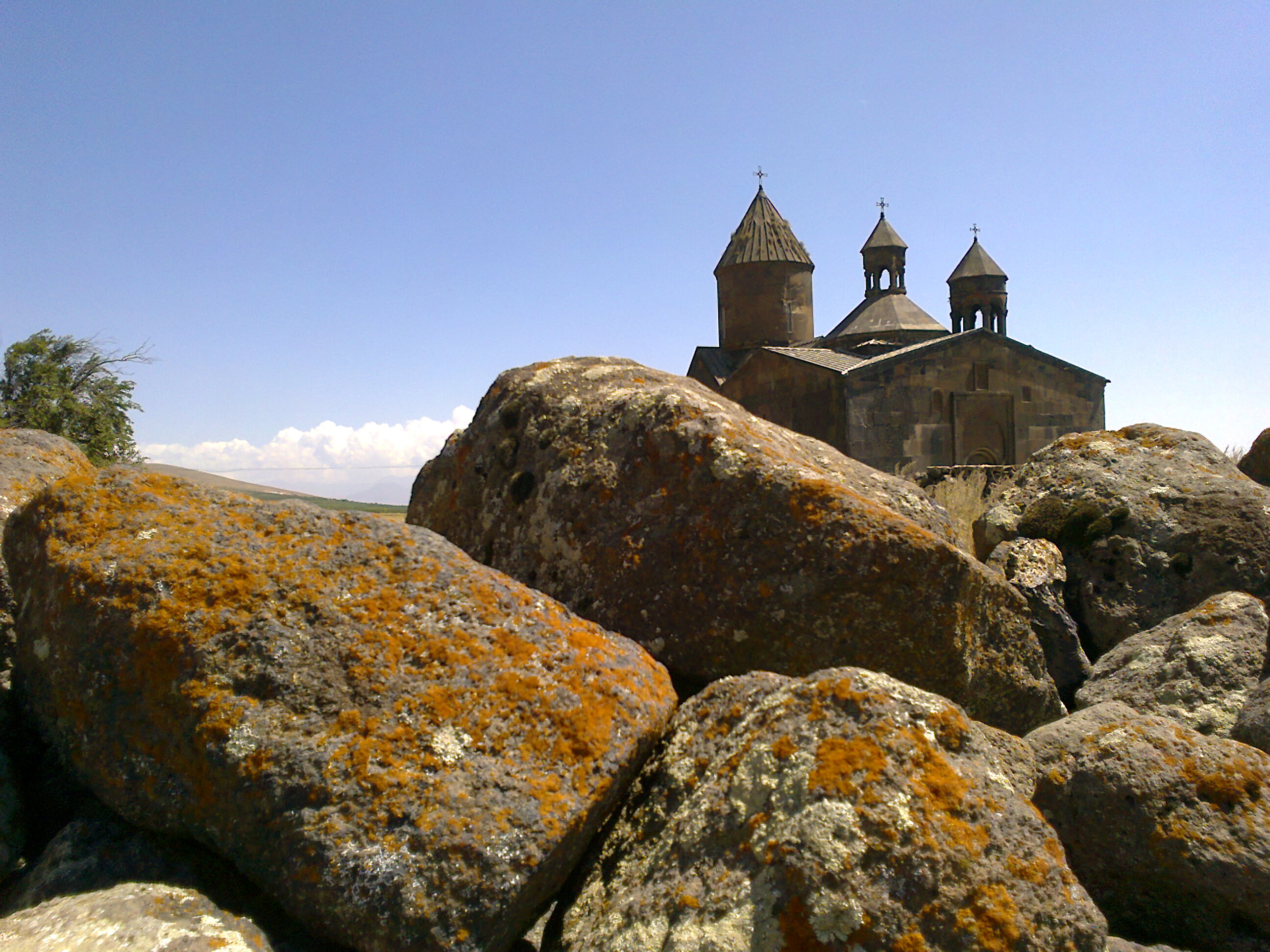 Սաղմոսավանի սբ. Աստվածածին եկեղեցու տեսքը 93/4.1